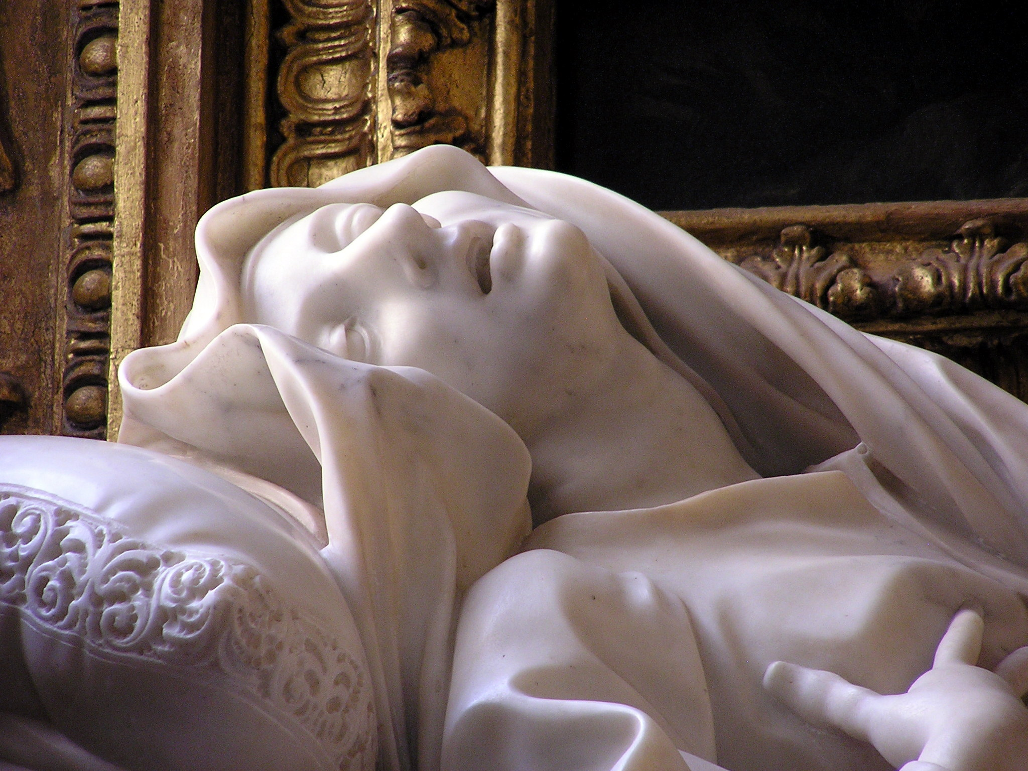 Sono io l'autore della foto e la cedo in pubblico dominio, rinunciando a tutti i diritti. Rappresenta il volto della statua della Beata Ludovica Alberoni scolpita da Gian Lorenzo Bernini; l'opera si trova nella Cappella Paluzi-Albertoni, nella Chiesa di San Francesco a Ripa, a Roma. Mentre la cappella è stata realizzata tra il 1622 e il 1625, la statua, considerata uno dei capolavori del Bernini, fu scolpita tra 1671 e il 1674. Il Bernini sfrutta la luce proveniente dalla finestra laterale preesistente per esaltare la drammaticità della sua opera che rappresenta la Beata nel momento del trapasso. Per questo motivo la foto è stata scattata con la luce naturale.